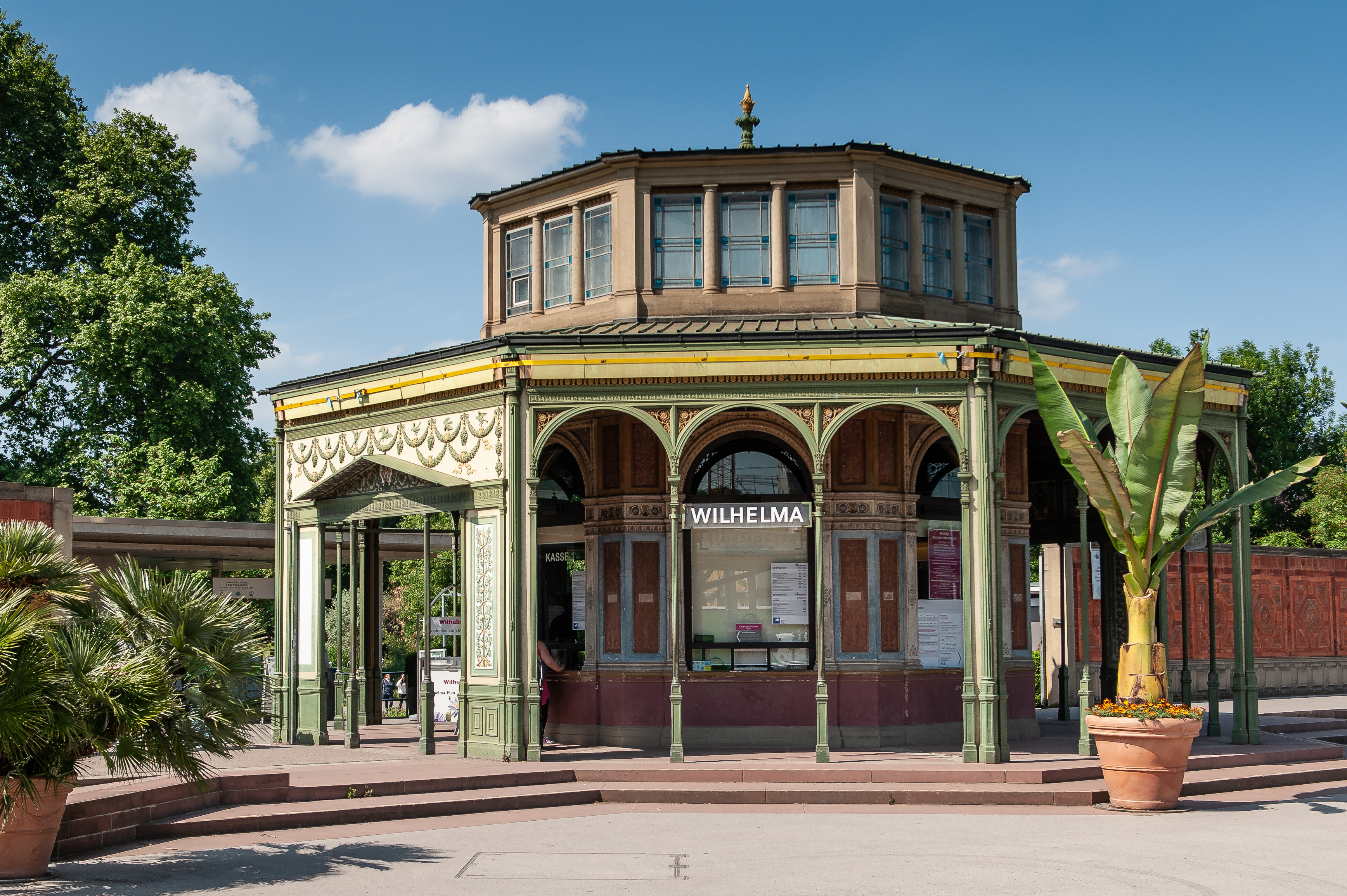 Wilhelma Stuttgart, Eingangspavillon